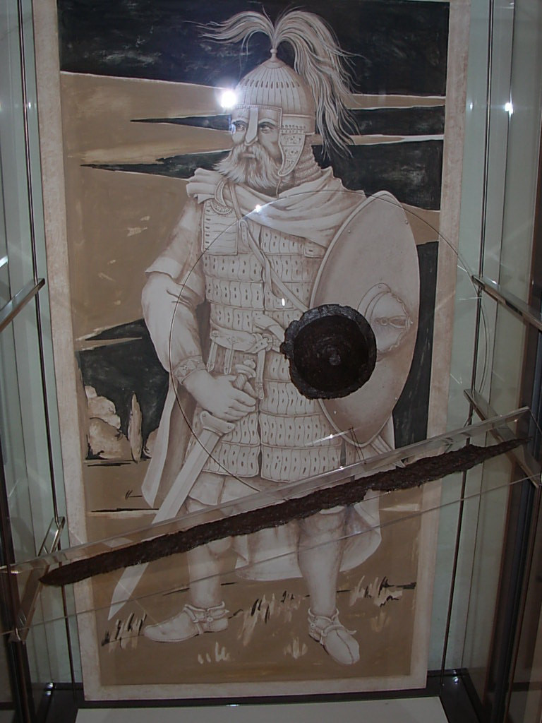 Spada e umbone di scudo di età longobarda dal territorio di Buttapietra